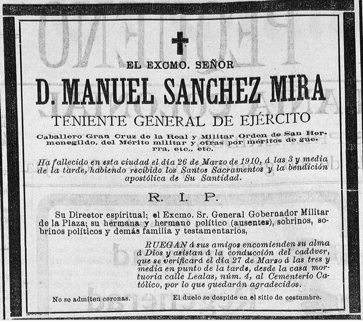 Sanchez mira esquela